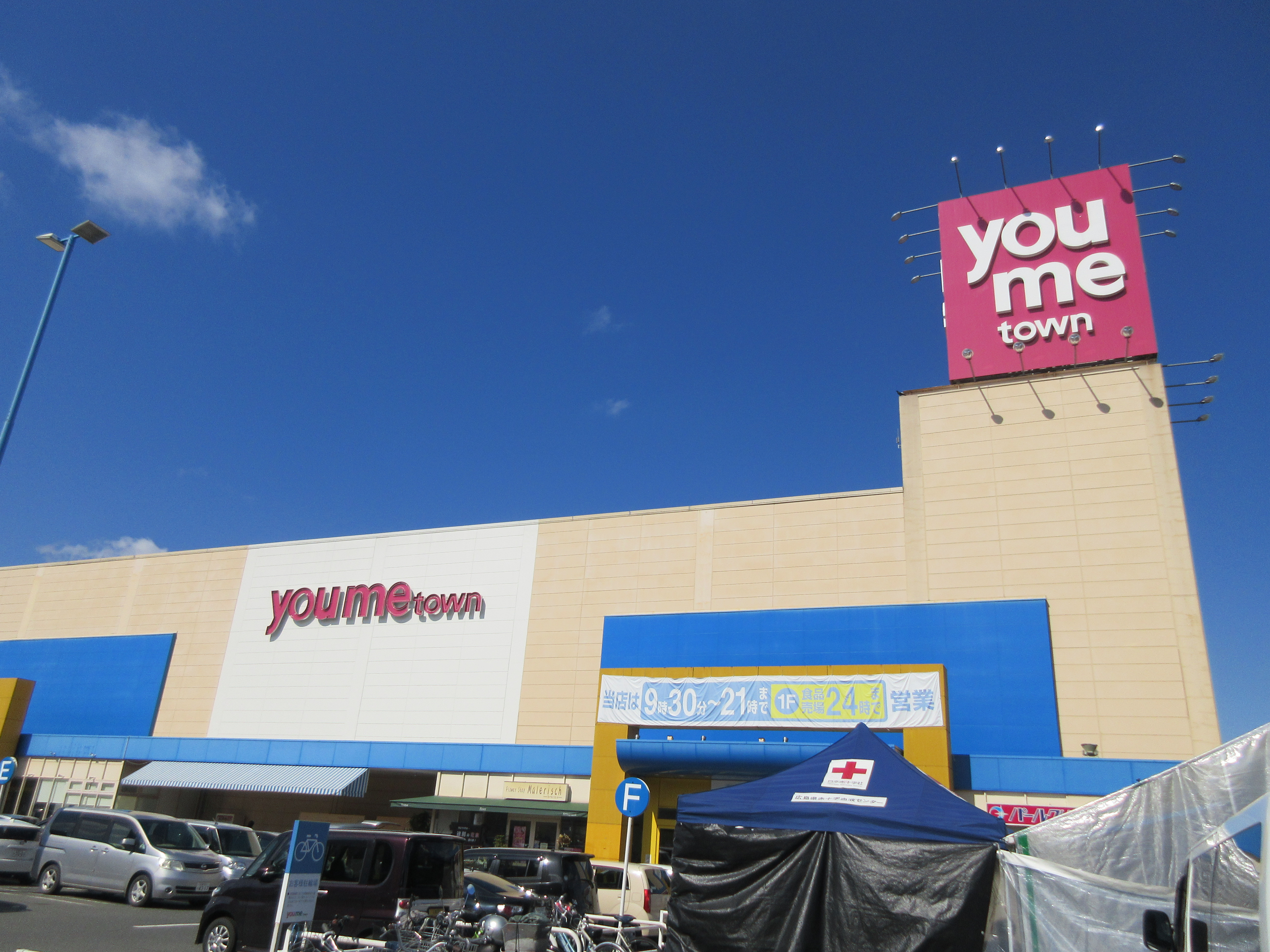 ゆめタウン学園店の画像です。